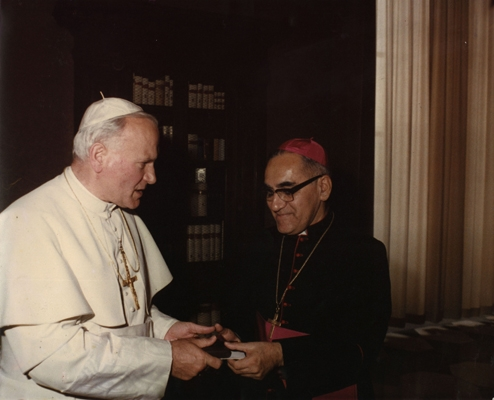 Monseñor Romero yl papa Juan Pablo II saliendo de una reunión privada en el Vaticano, unos meses después de asceder al trono pontificio.